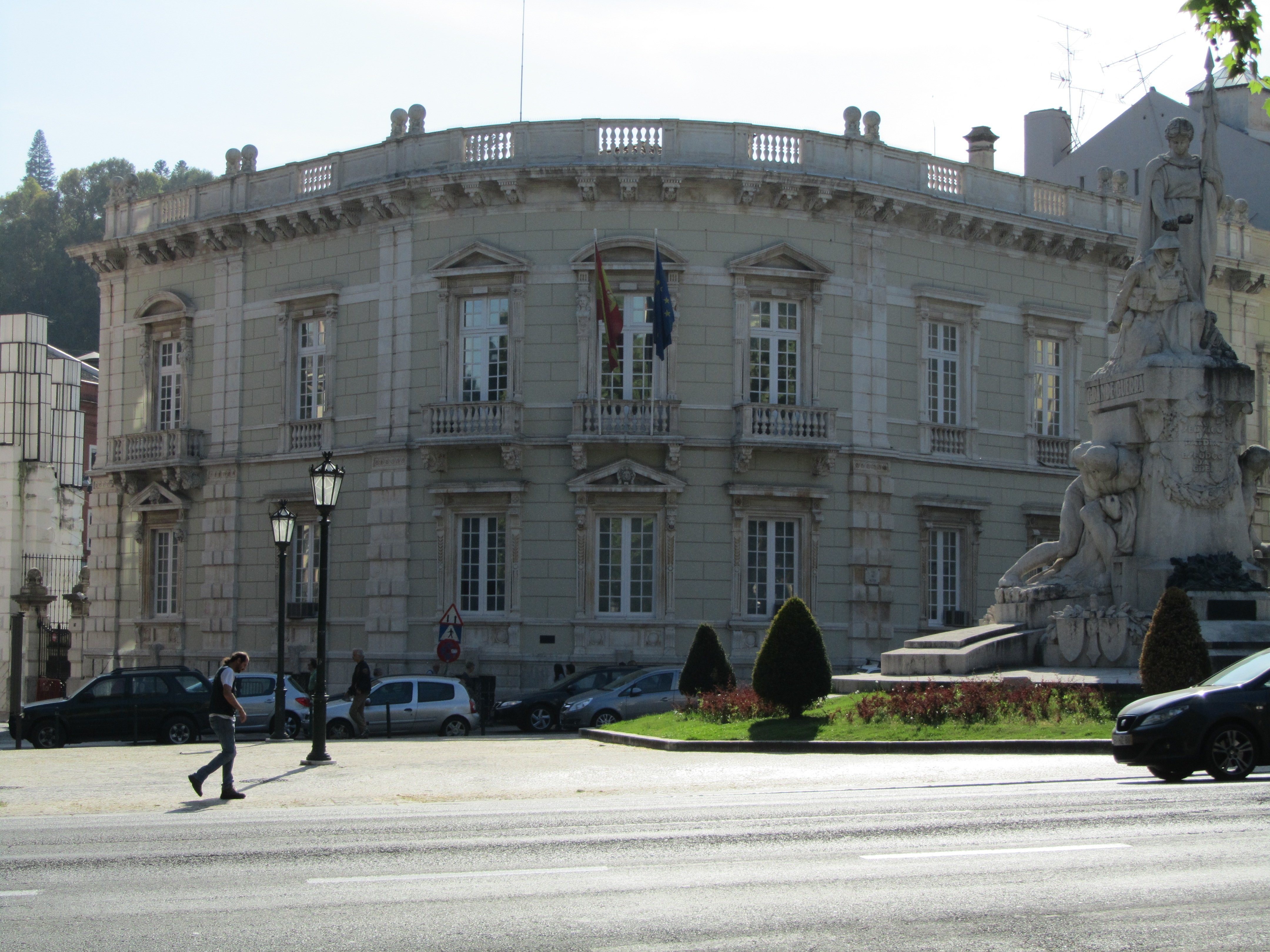 Palácio Lima Mayer, Lisboa